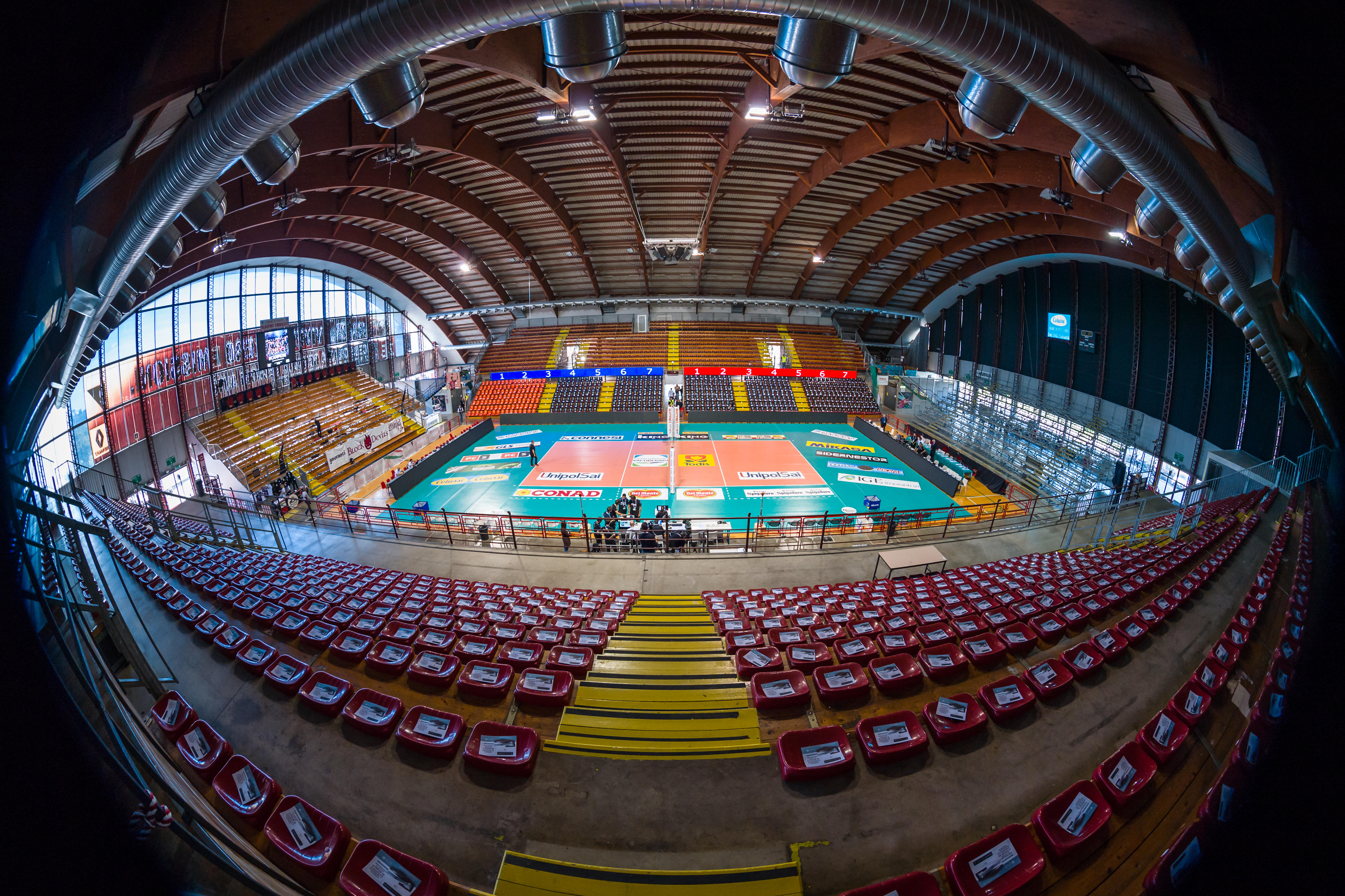 il PalaEvangelisti prima del match «Sir Safety Conad Perugia - Kioene Padova» 1ª giornata Campionato italiano di Pallavolo Maschile Serie A1 SuperLega UnipolSai presso Perugia IT, 15 ottobre 2017. Foto: Michele Benda [Riferimento foto: 2017-10-15/_ND58305]